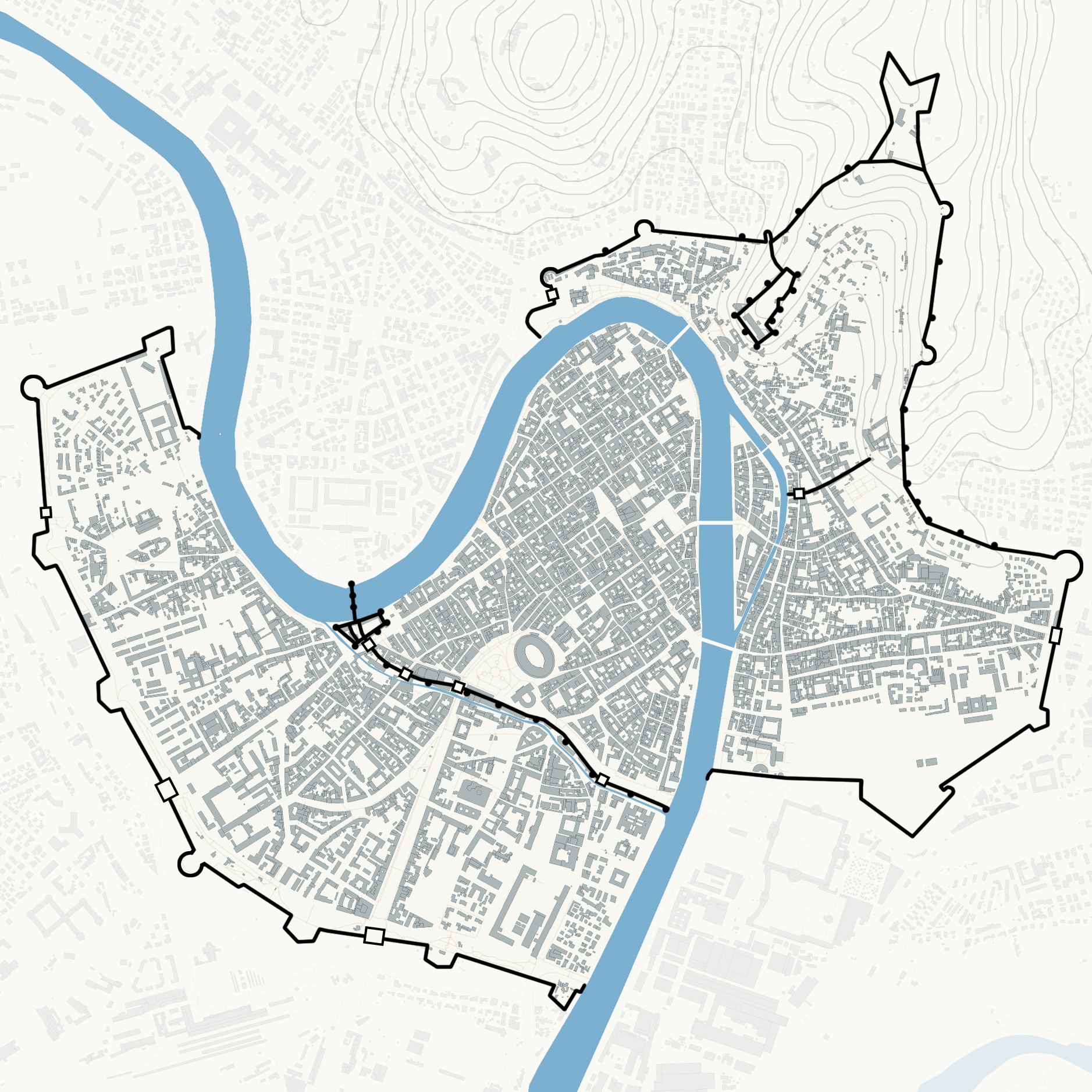 Planimetria della città di Verona con le mura e le porte urbiche principali. Vedi anche Le mura di Verona di Annamaria Conforti Calcagni.